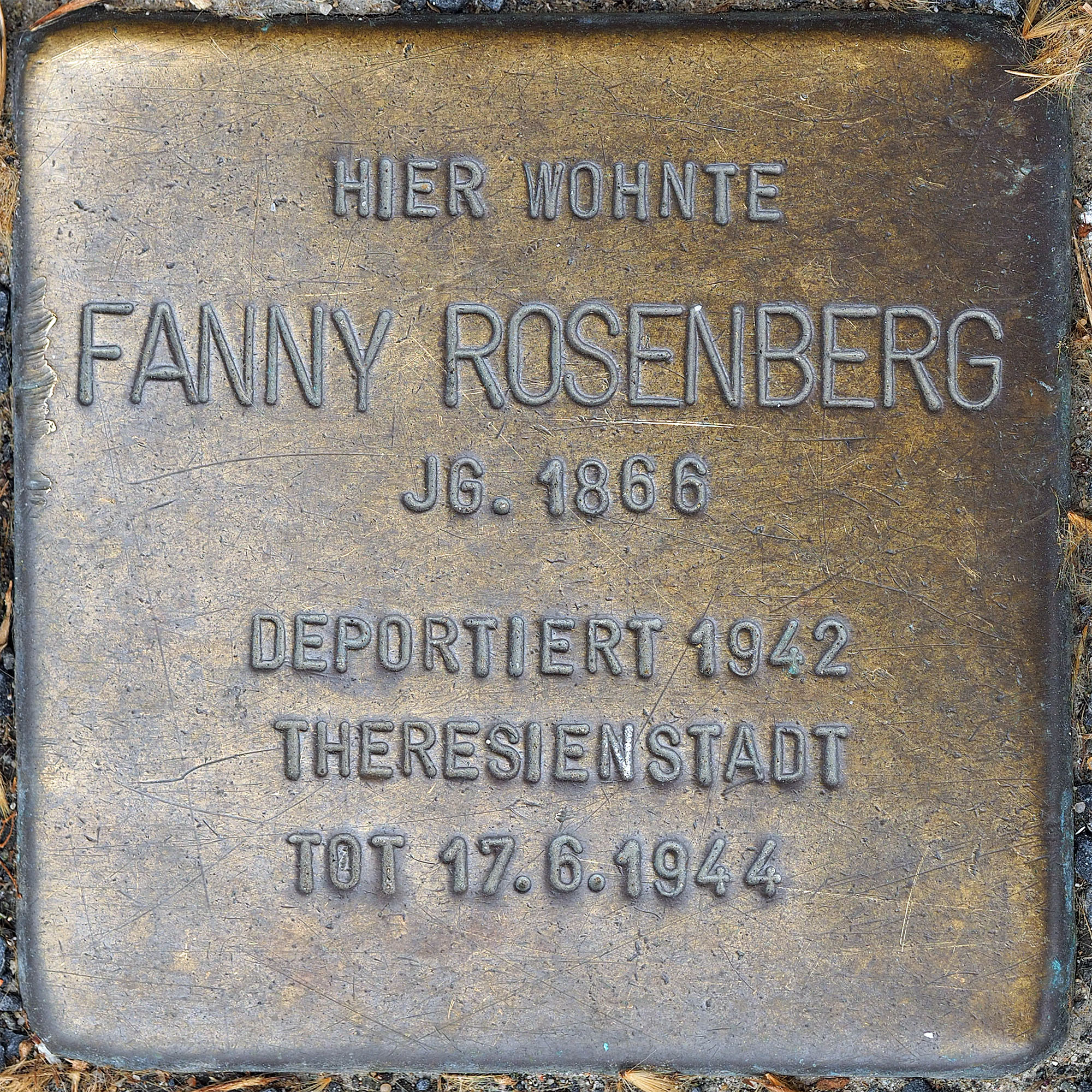 Stolpersteine MG: Rosenberg, Fanny